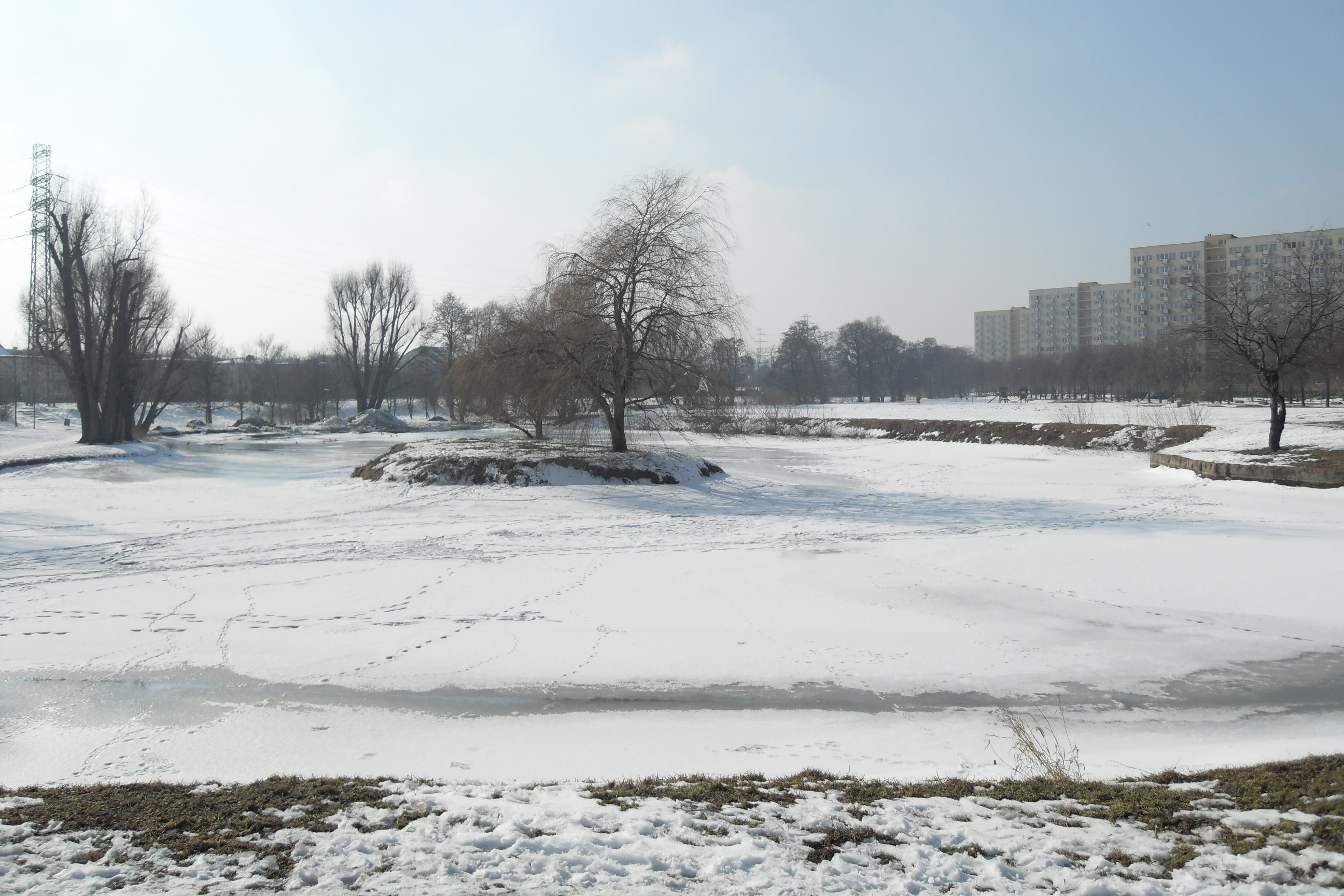 Gdańsk Przymorze, Potok Oliwski - staw i wyspa.